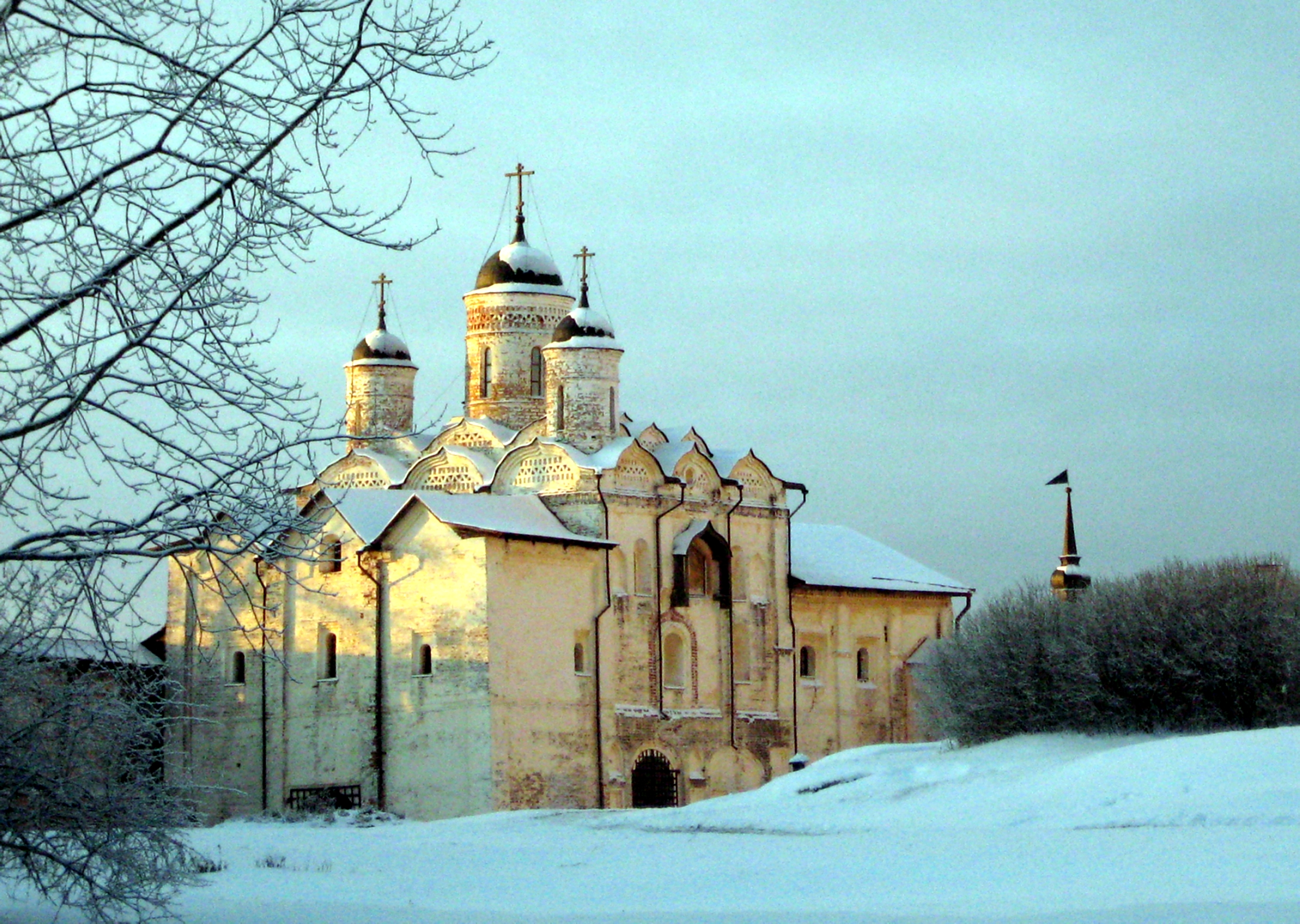 Водяные ворота с надвратной церковью Преображения. Кирилло-Белозерский монастырь